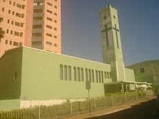 Fotografia da IPJ